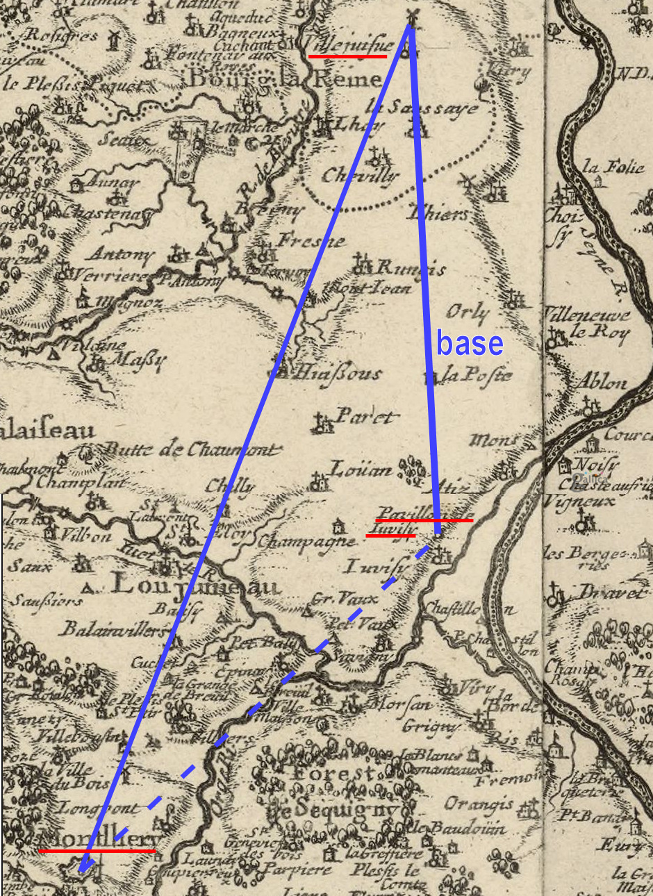 Méridienne de Picard : base initiale et un triangle sur un détail de la carte de Vivier des environs de Paris.